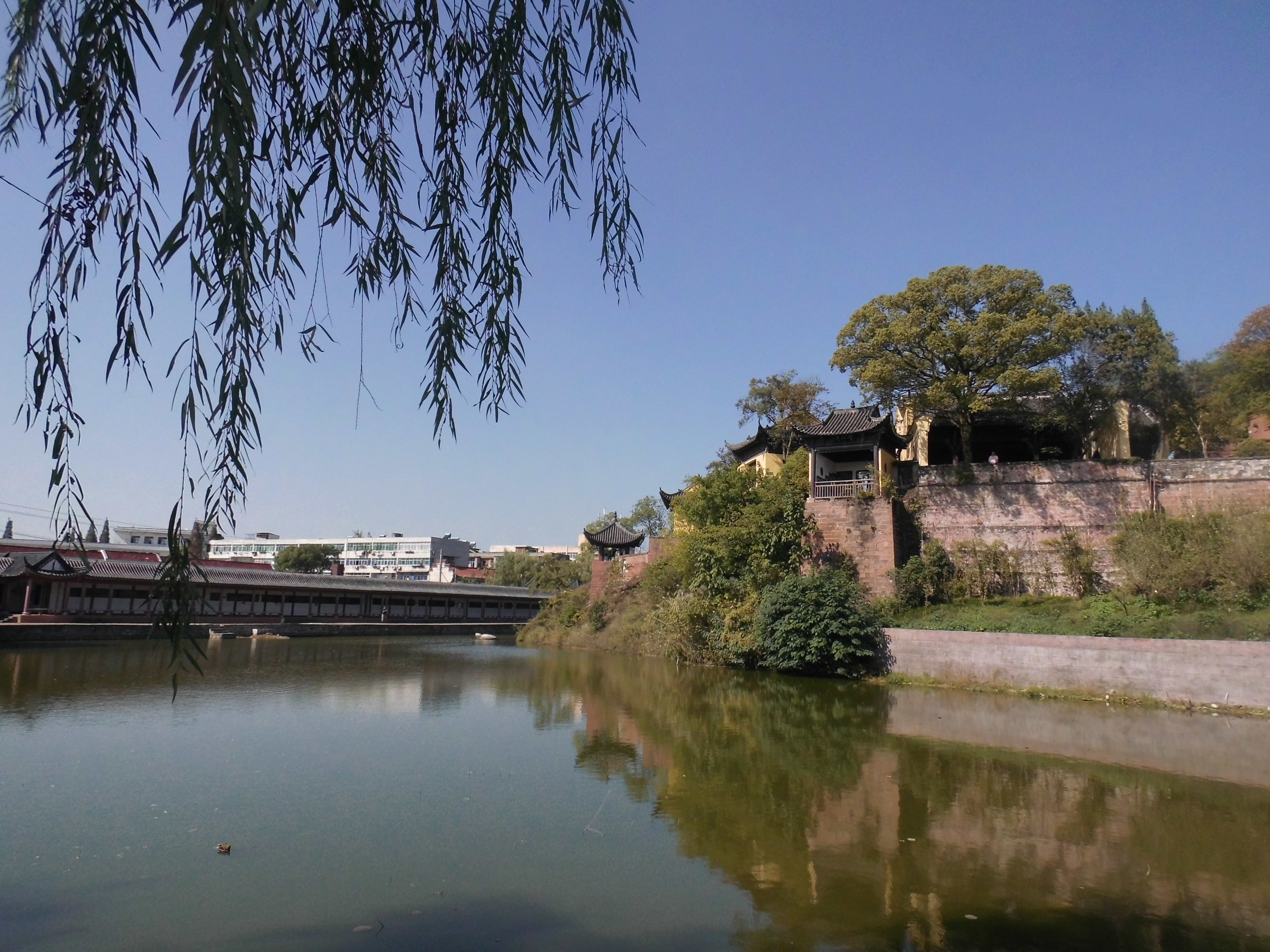 东坡赤壁建筑群